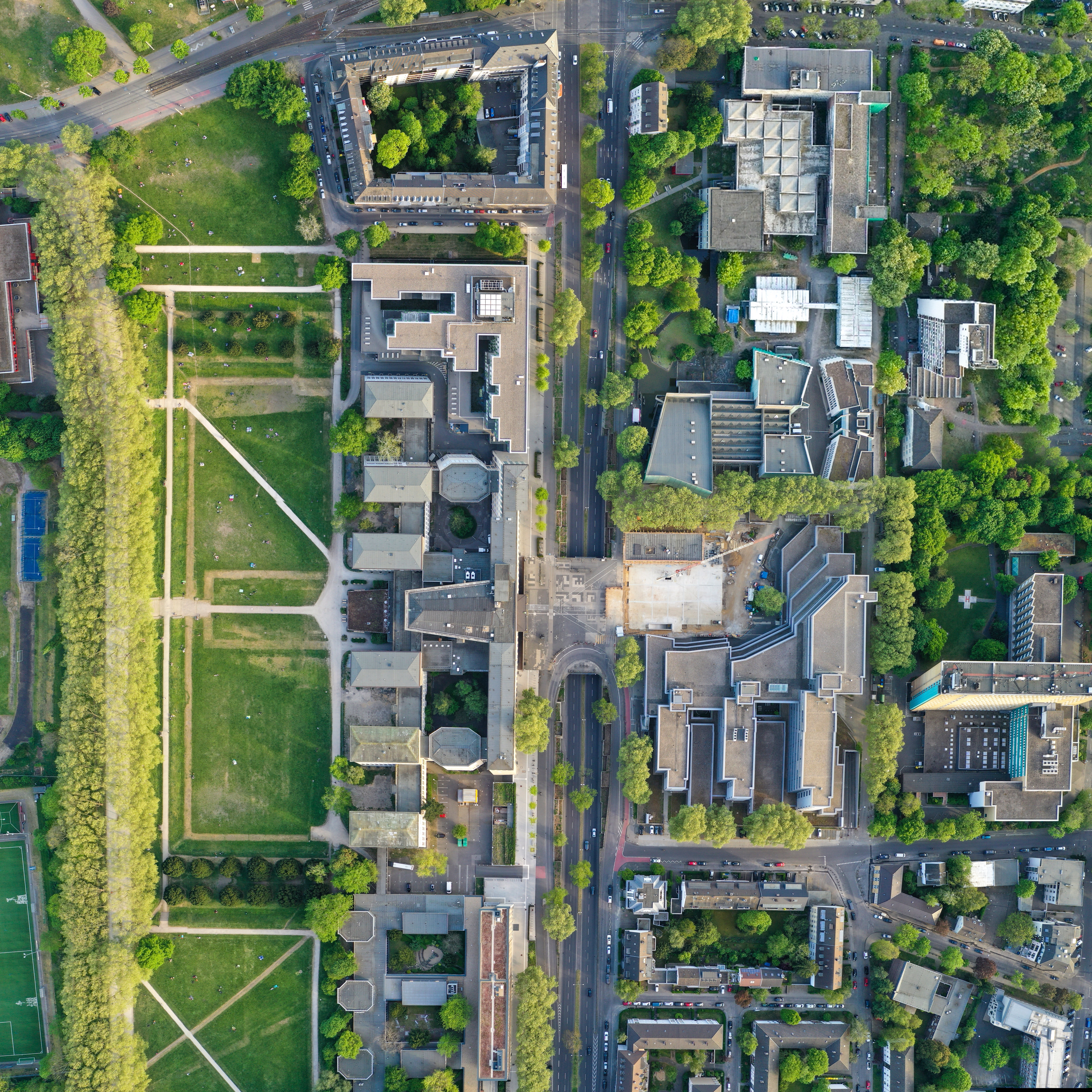 Dieses in hoher Auflösung verfügbare orthogonal aufgenommene Foto besteht aus 17 Einzelbildern, die mit einer Stitching-Software zusammengefügt wurden. Es zeigt ungefähr in Nord-Süd-Richtung. Der Albertus-Magnus-Platz befindet sich exakt in der Bildmitte. Die senkrechte Linie ist die unter dem Platz hindurchführende Universitätsstraße. Rechts vom Platz befindet sich das Hauptgebäude der Universität, links das Philosophikum. Das Hochhaus am linken Bildrand ist das Evangelische Klinikum Weyertal. Südlich schließt sich daran der Geusenfriedhof an. Der Gebäudekomplex unmittelbar rechts daneben mit seinen vielen Oberlichtern ist die Universitätsbibliothek. Sie befindet sich an der Ecke zur Kerpener Straße. Am unteren rechten Bildrand sind die Schienen der Stadtbahn zu sehen; sie verlaufen hier durch die (nicht weiter sichtbare) Zülpicher Straße. Die Drohnenaufnahme aus 200 Metern Höhe war durch Genehmigungen der Stadt Köln, der Bezirksregierung Düsseldorf und der Deutschen Flugsicherung möglich. Das Foto steht unter der CC-BY-SA-4.0 Lizenz und darf, auch in Ausschnitten, nur unter Angabe von Ross und Reiter verwendet werden, das heißt mit Namensnennung des Fotografen und der Angabe dieser Webseite hier.